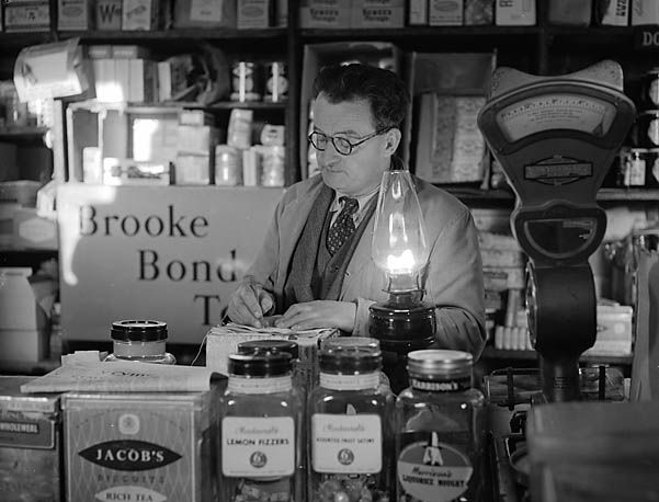 Teitl Cymraeg/Welsh title: Pentref Llanfachreth yn y tywyllwch; heb drydan Ffotograffydd/Photographer: Geoff Charles (1909-2002) Dyddiad/Date: January 31, 1957. Cyfrwng/Medium: Negydd ffilm / Film negative Cyfeiriad/Reference: (gch10523) Rhif cofnod / Record no.: 3369416 Rhagor o wybodaeth am gasgliad Geoff Charles yn Llyfrgell Genedlaethol Cymru More information about the Geoff Charles Collection at the National Library of Wales